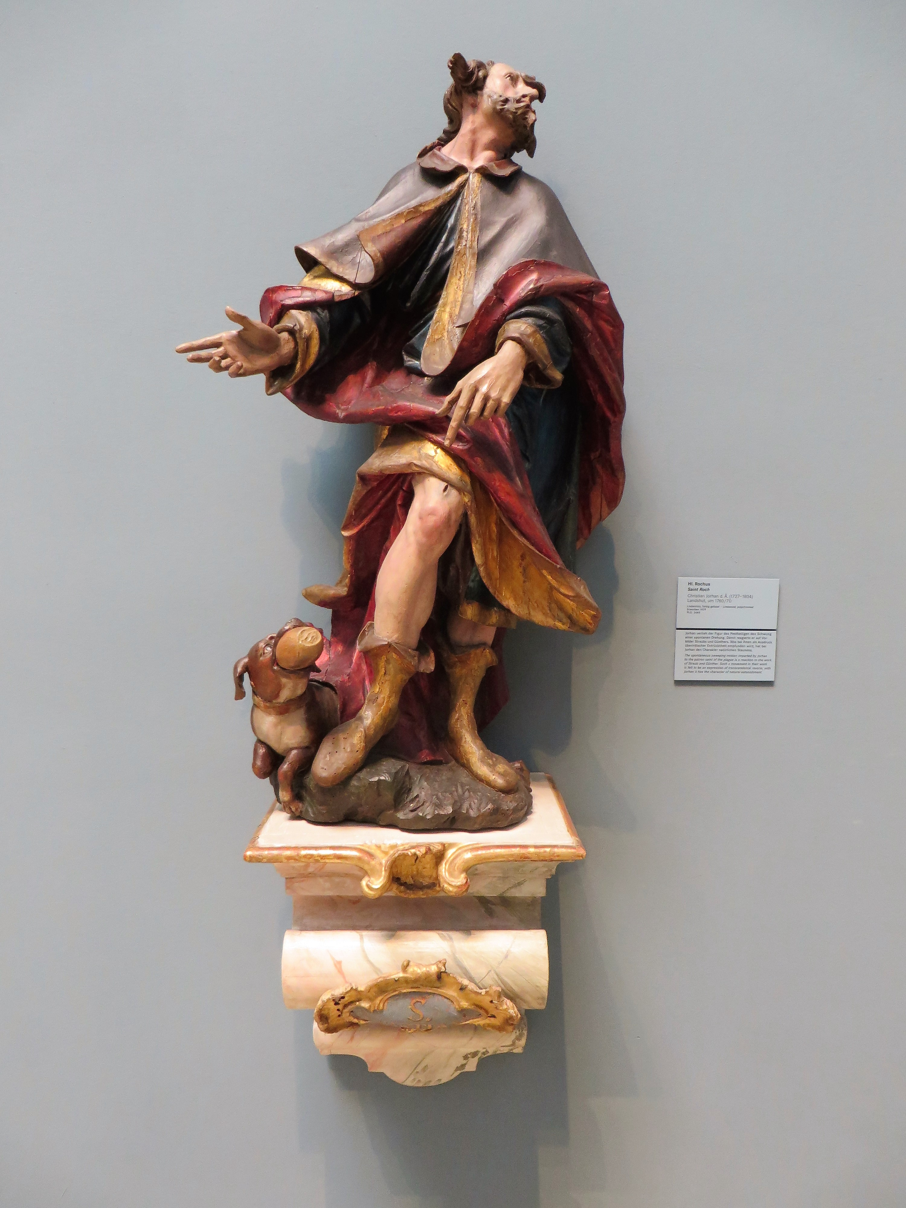 Germanisches Nationalmuseum in Nürnberg. Figur des hl. Rochus von Christian Jorhan d. Ä., Landshut, um 1760/70, Lindenholz farbig gefasst.